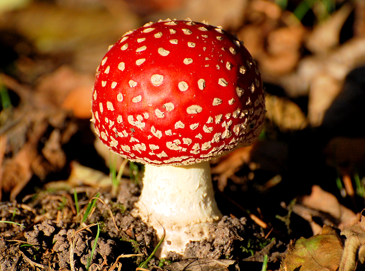 Amanita muscaria_Mushroom